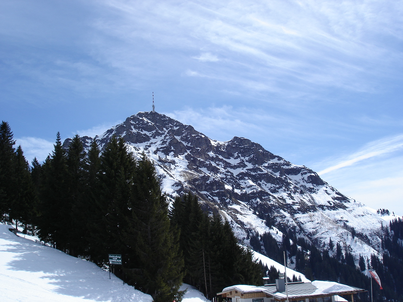 Kitzbühler Horn from north